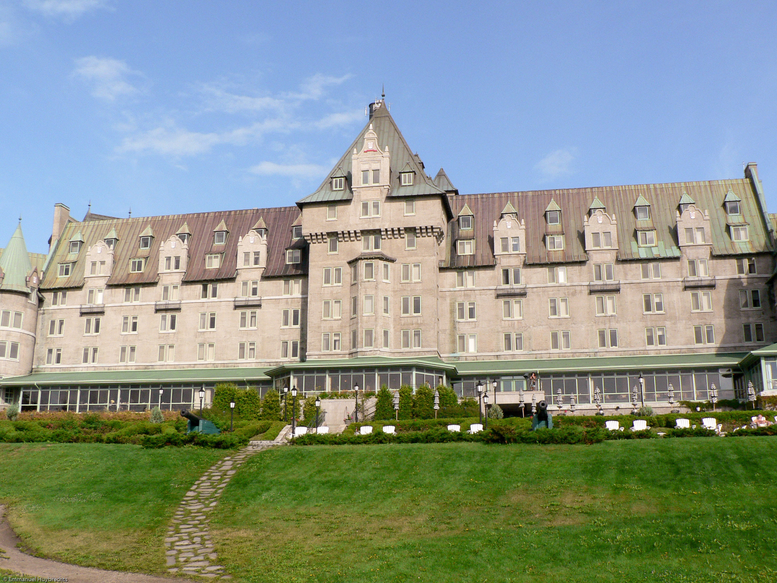 Manoir Richelieu